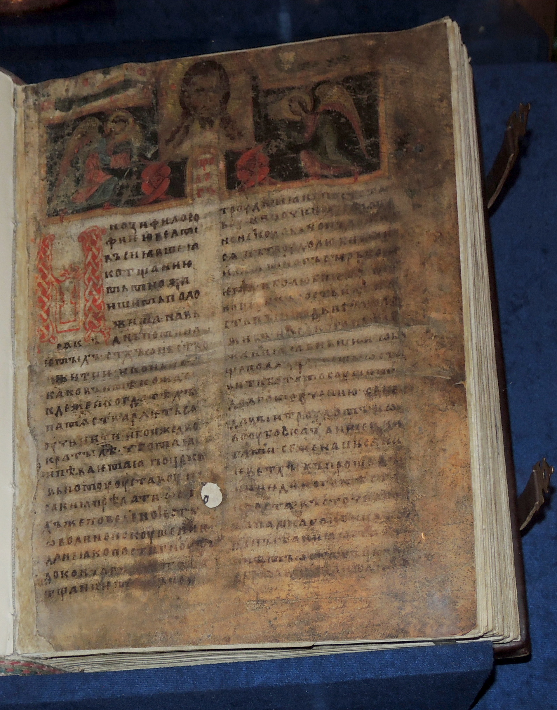 Пролог, сентябрь-январь ("Лобковский Пролог"). Писец Тимофей, Новгород, 1262 или 1282 г. Рукопись: пергамен, чернила, киноварь; устав, инициалы, миниатюра с изображением Спаса Нерукотворного, инициал. Переплет 19 века. Пролог сентябрьской половины года включает житийные повести и слова, распределенные по дням года. Из русских чтений - Сказание об убиение Глеба (5 сентября). ГИМ